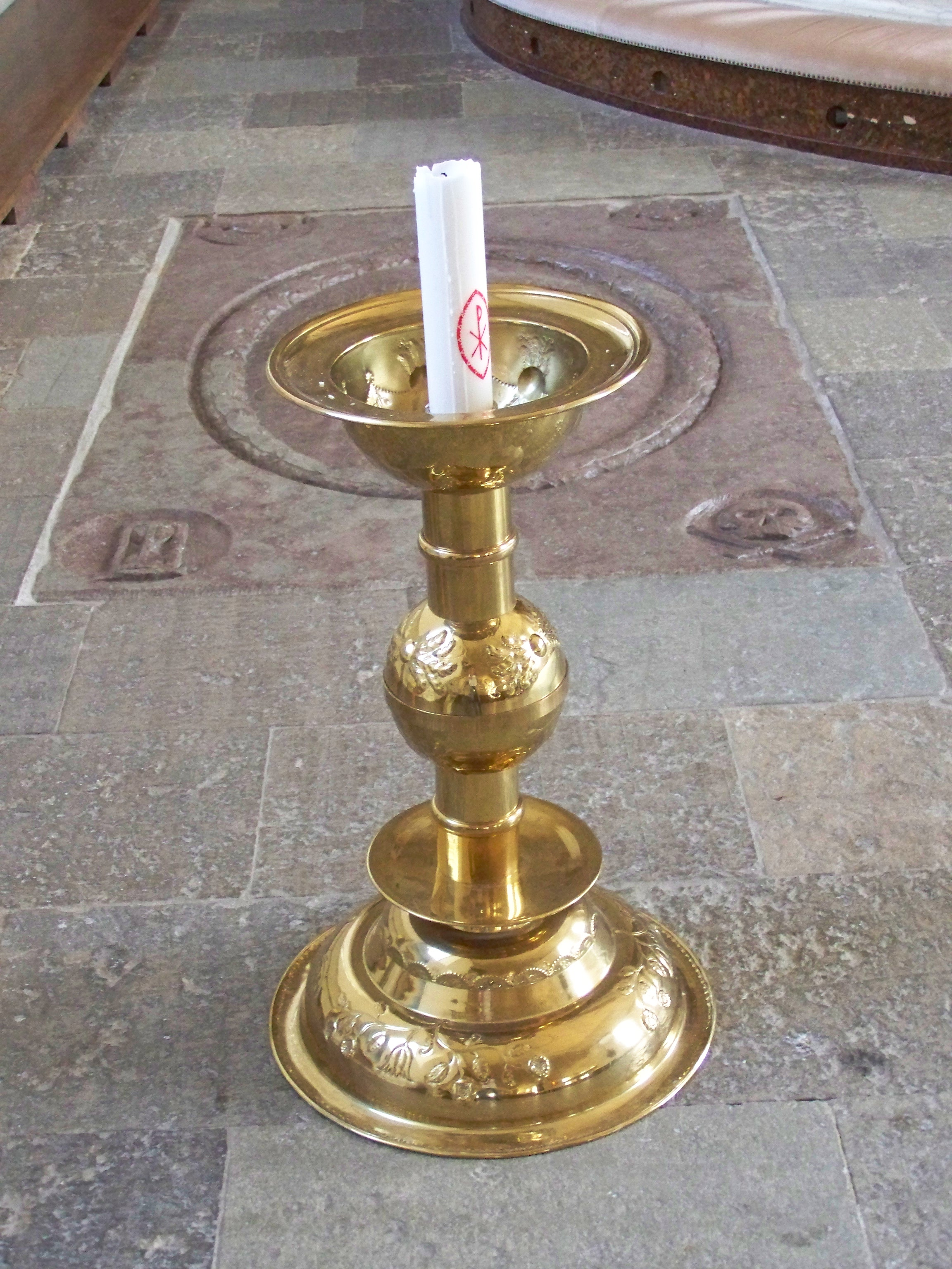 In Schweden. Carl Gustafs kyrka